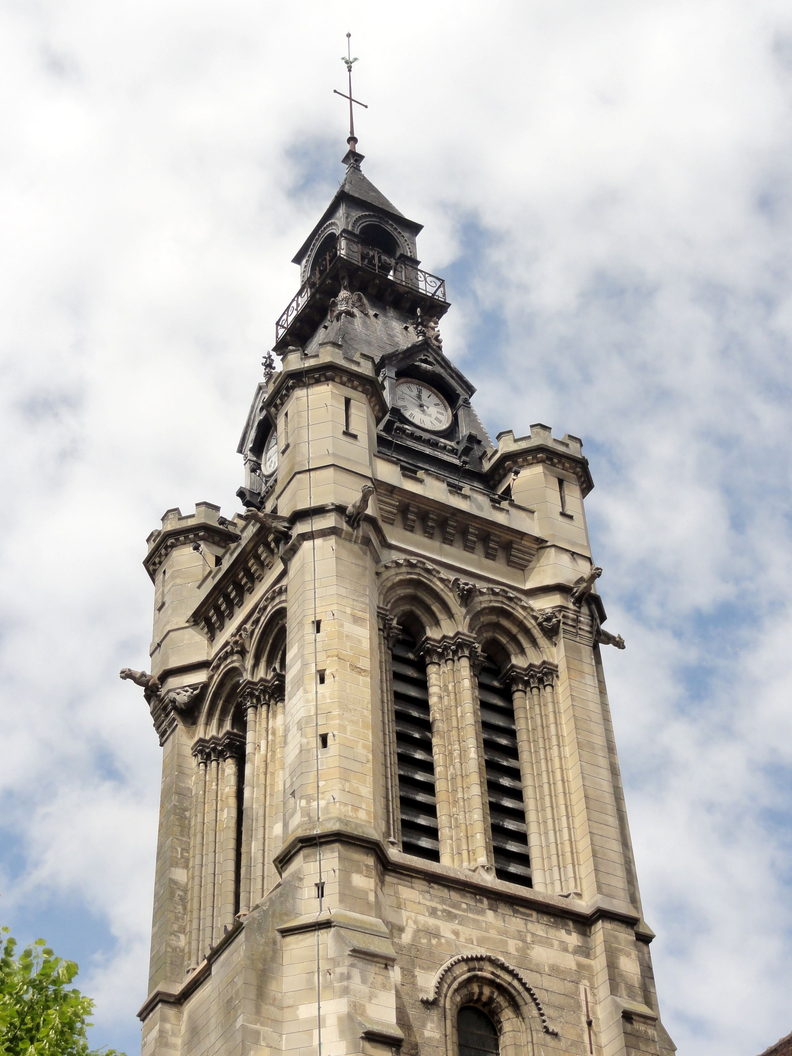 Clocher, vue depuis le sud-est.